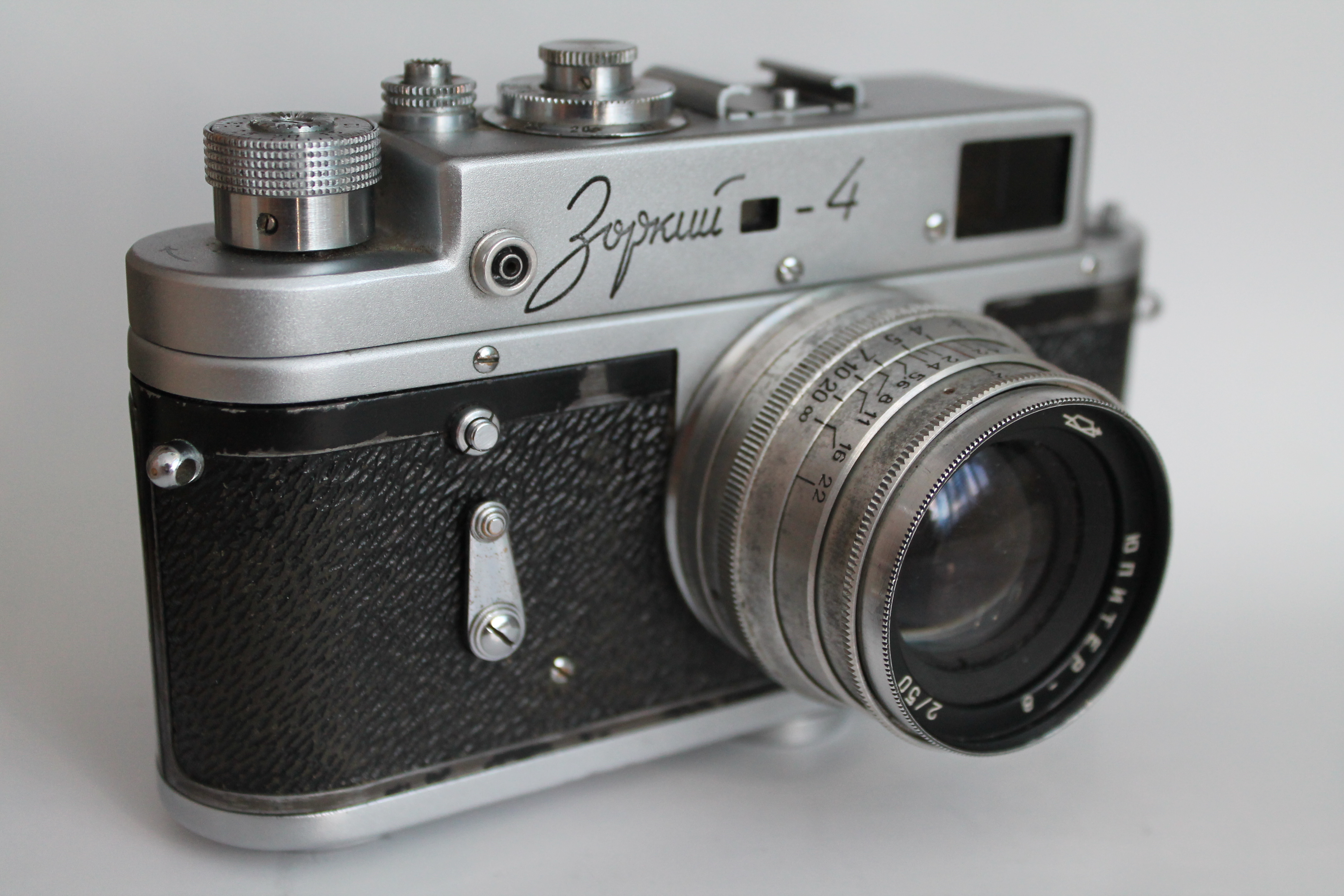 Zorkij 4 z 1963 roku z obiektywem standardowym. Należał do tarnowskiego fotografa Czesława Seredy.